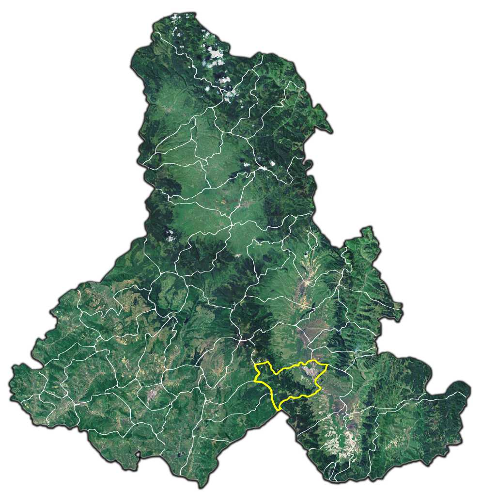 Miercurea Ciuc jud Harghita.